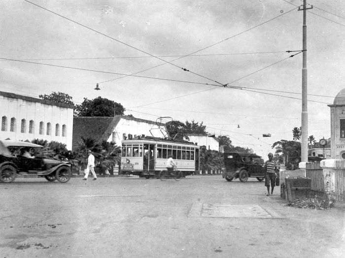 Repronegatief. Electrische tram te Soerabaia (Lijn 3)